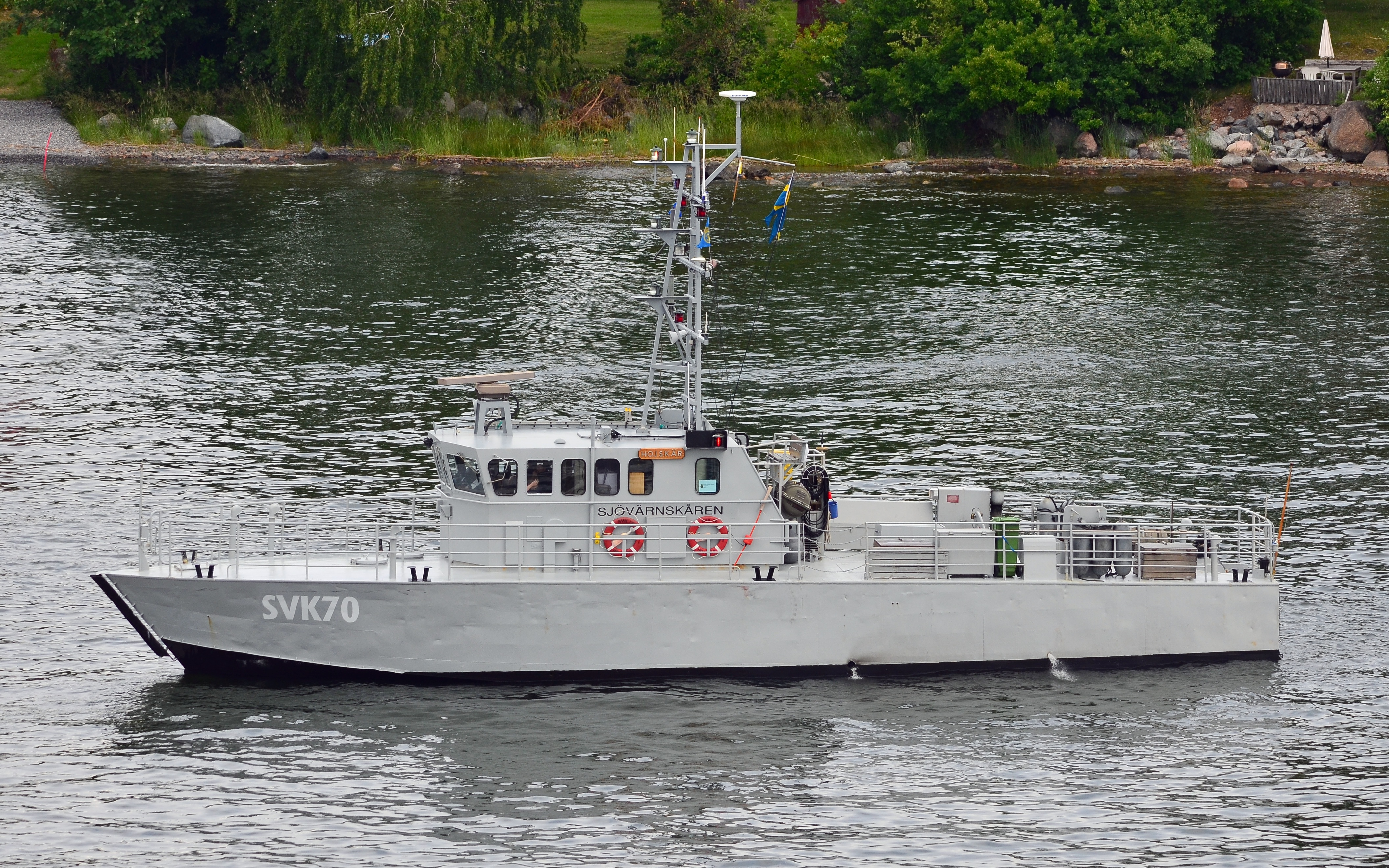 Sjövärnskårens fartyg Hojskär.